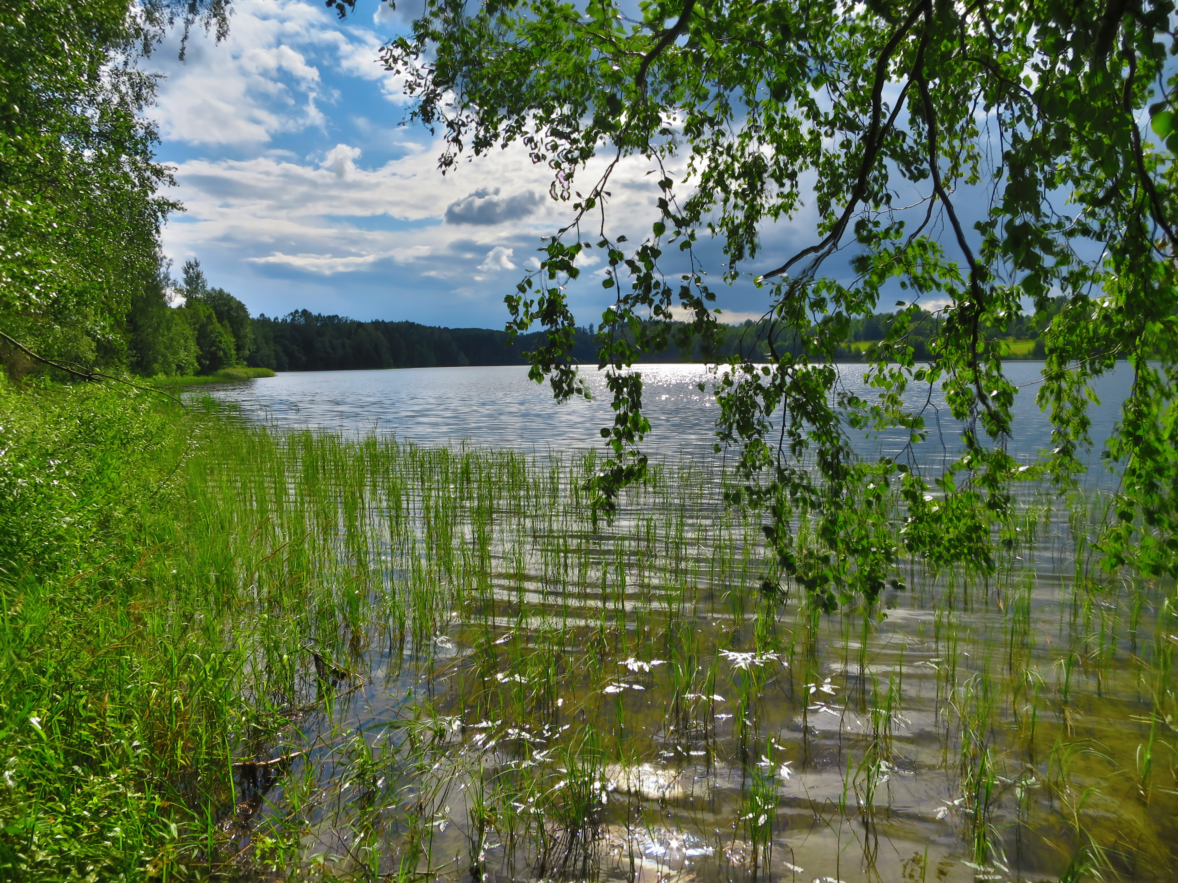 Piigandi järv vaade idast